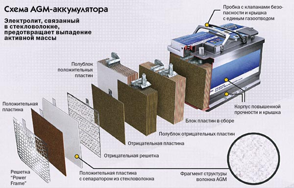 Як влаштований AGM акумулятор